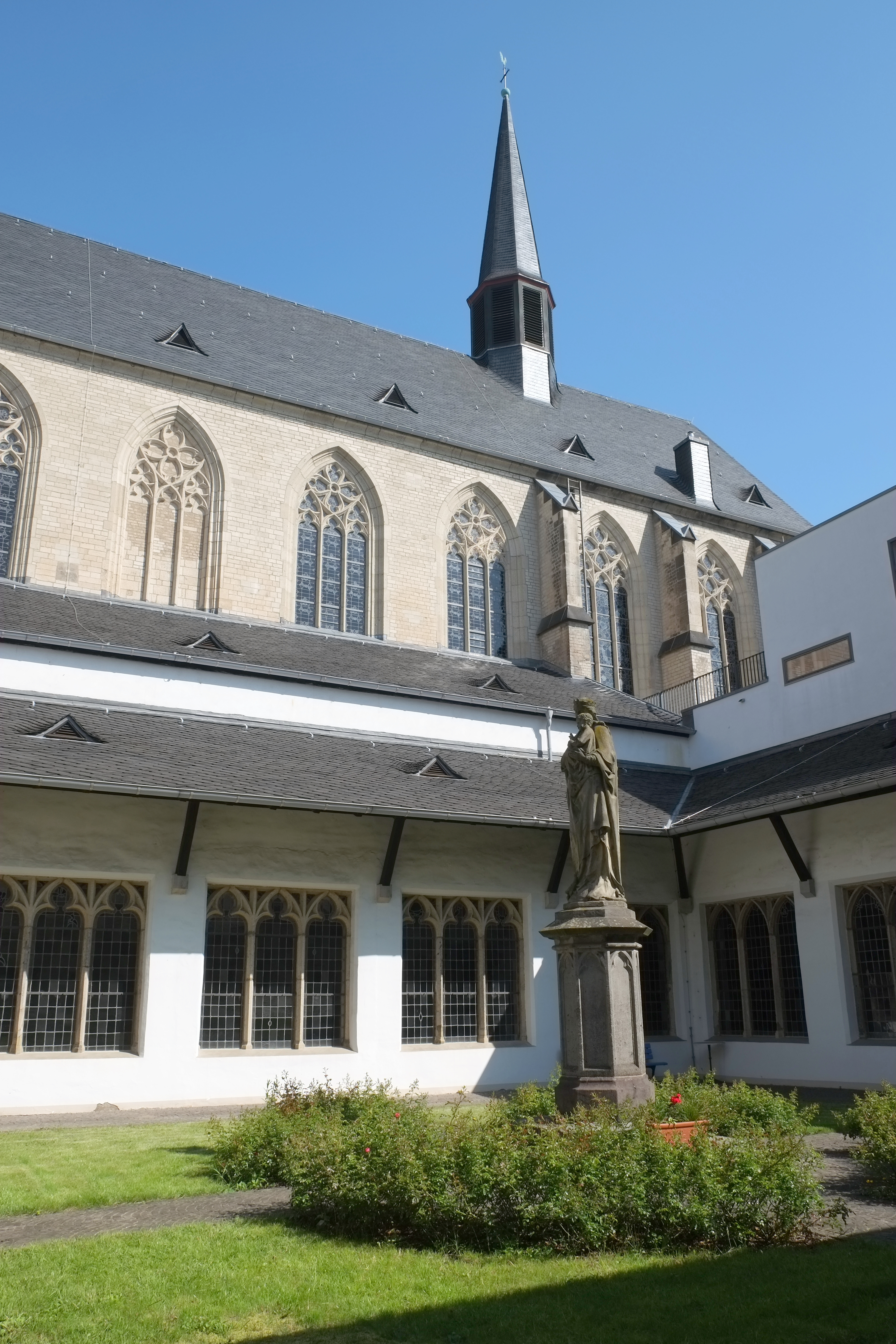 Kirche St. Remigius in Bonn (Deutschland)